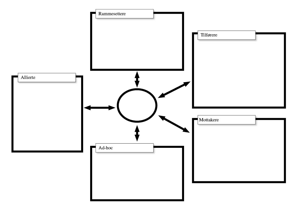 Stakeholders map